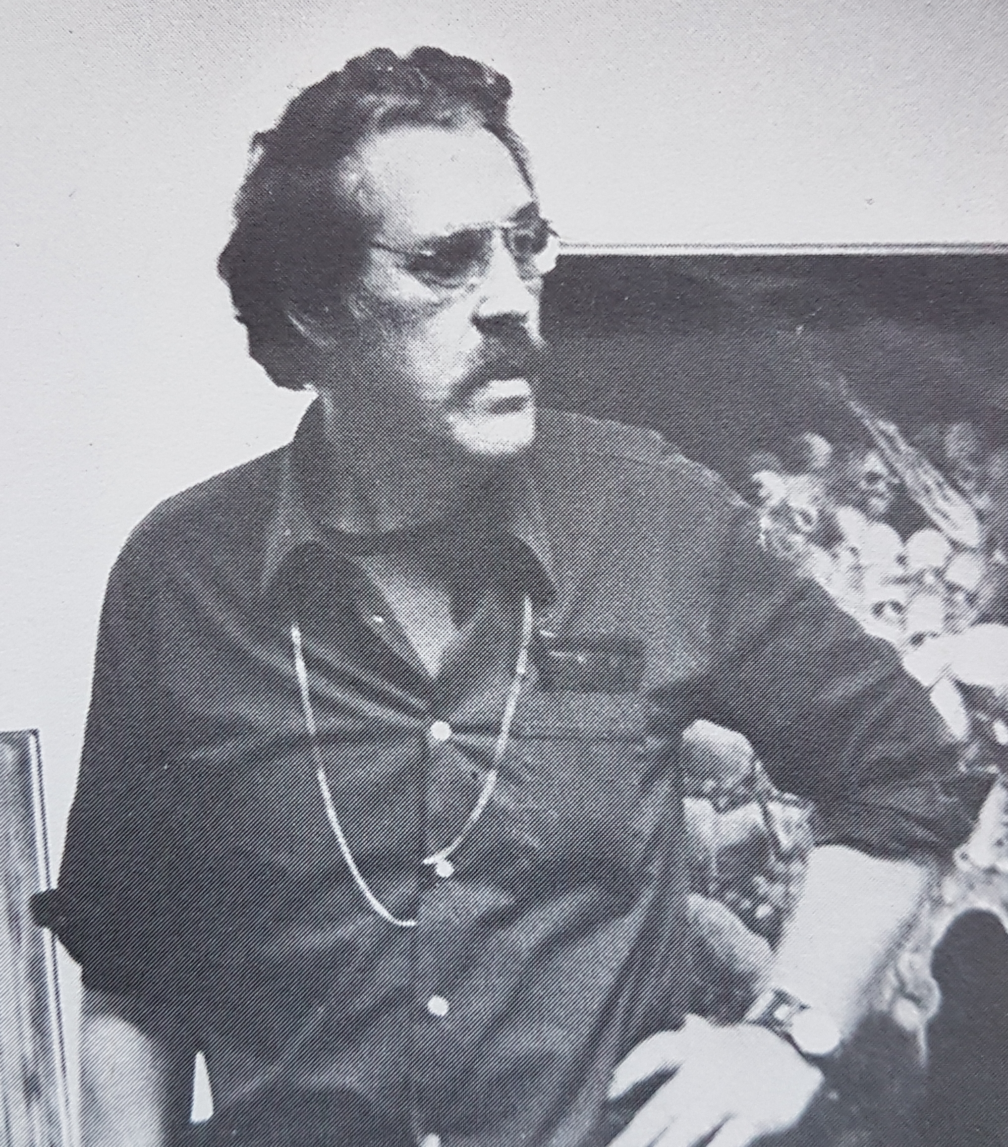 Hans Kajtorp Artist.from Sweden